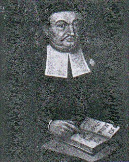 Samuel Hruškovic